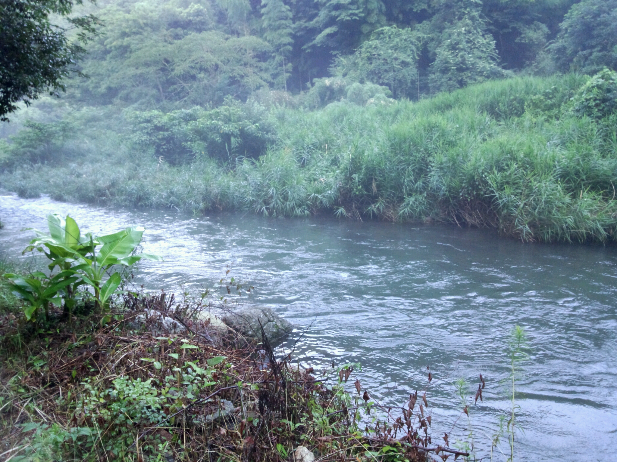 Hashirano, Iwakuni, Yamaguchi Prefecture 741-0073, Japan